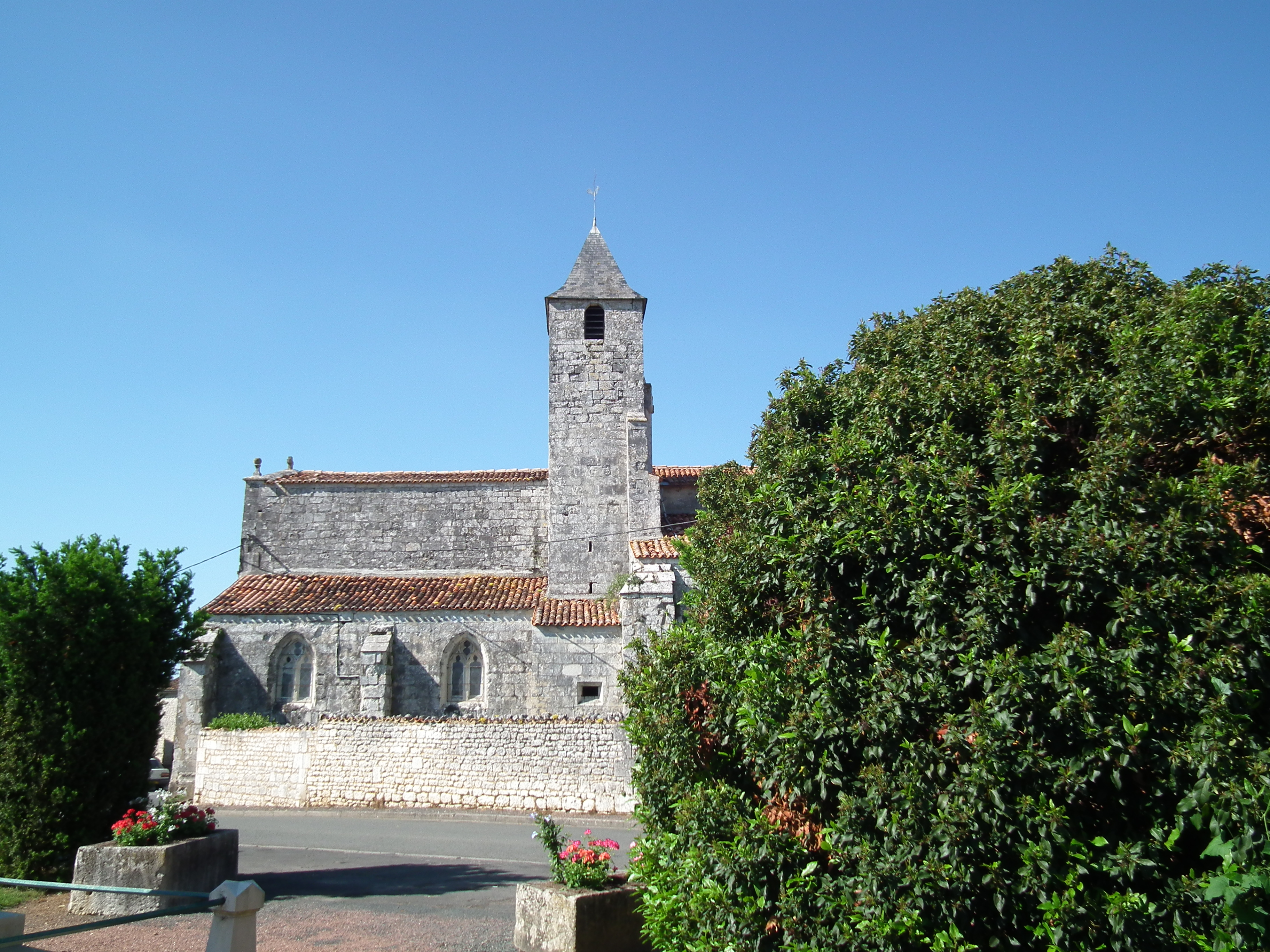 Le centre-bourg des Essards (Charente-Maritime)